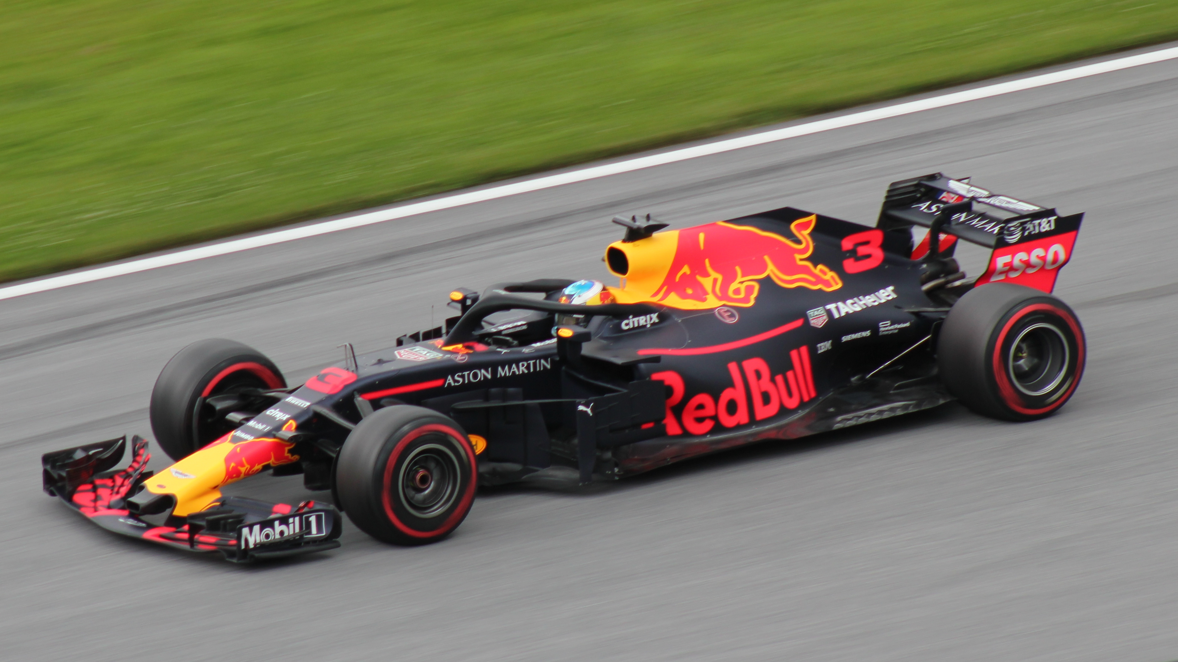 3 Ricciardo beim Rennwochenende in Österreich 2018